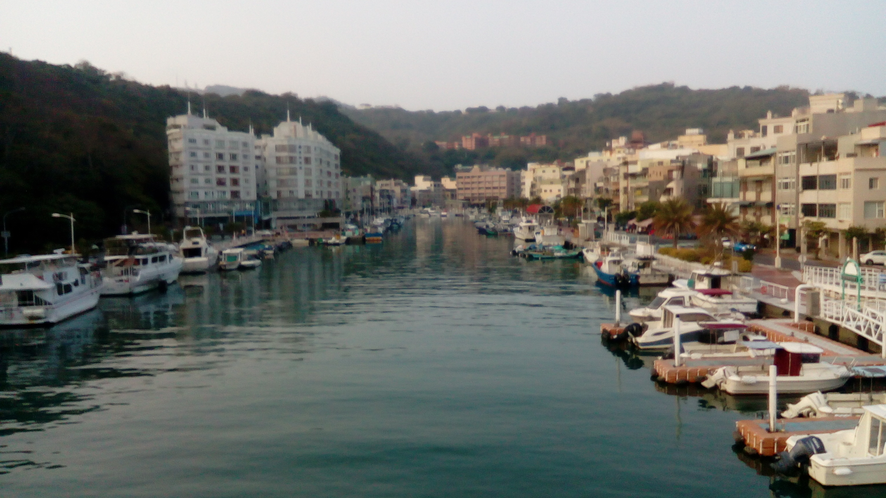 位於鼓山區哈瑪星 從第一船渠景觀橋上由下拍攝